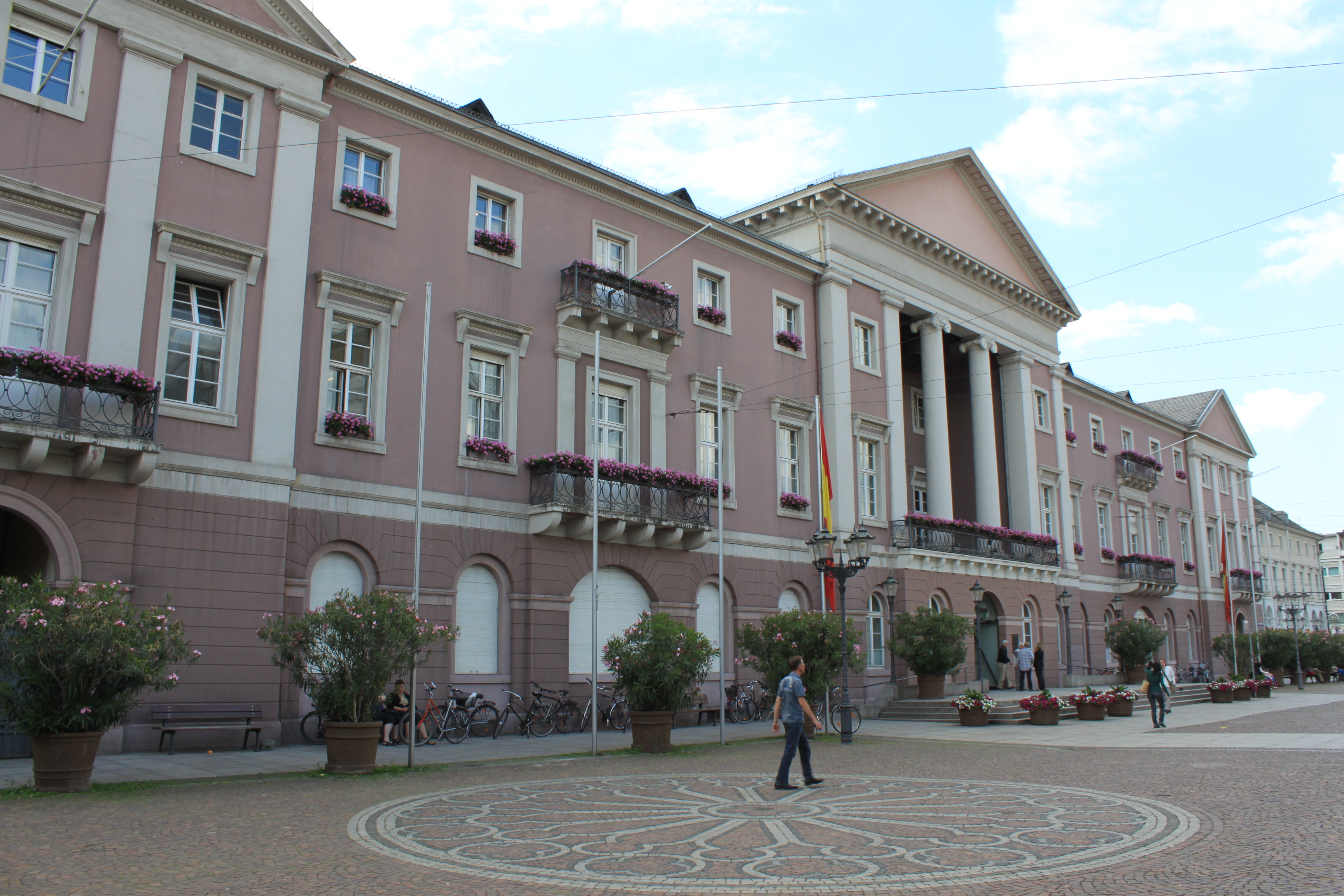 Karlsruher Rathaus am Marktplatz